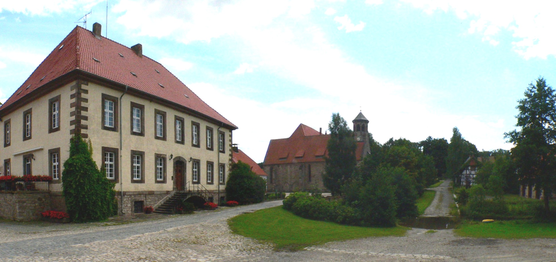 Klostergut Mariengarten in der Gemeinde Rosdorf bei Göttingen, Deutschland